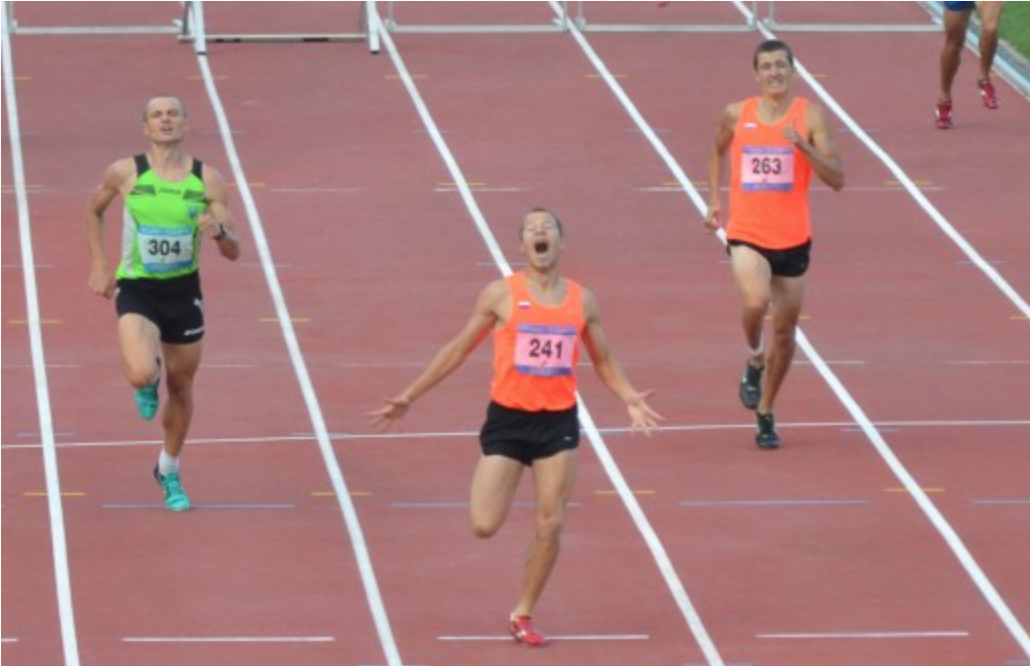 400с с барьером